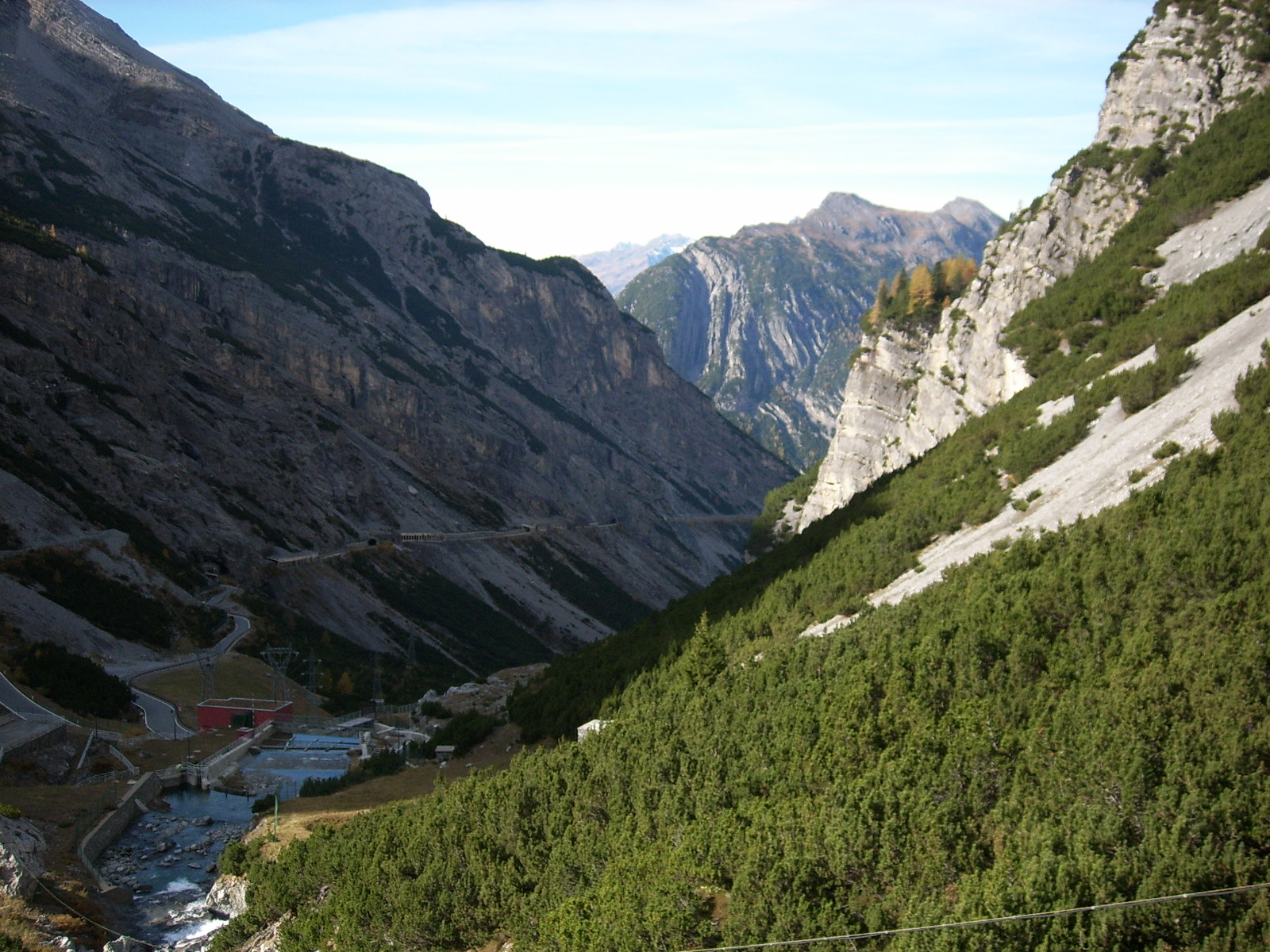 Nationalpark_Stelvio_Braulioschlucht, Italy